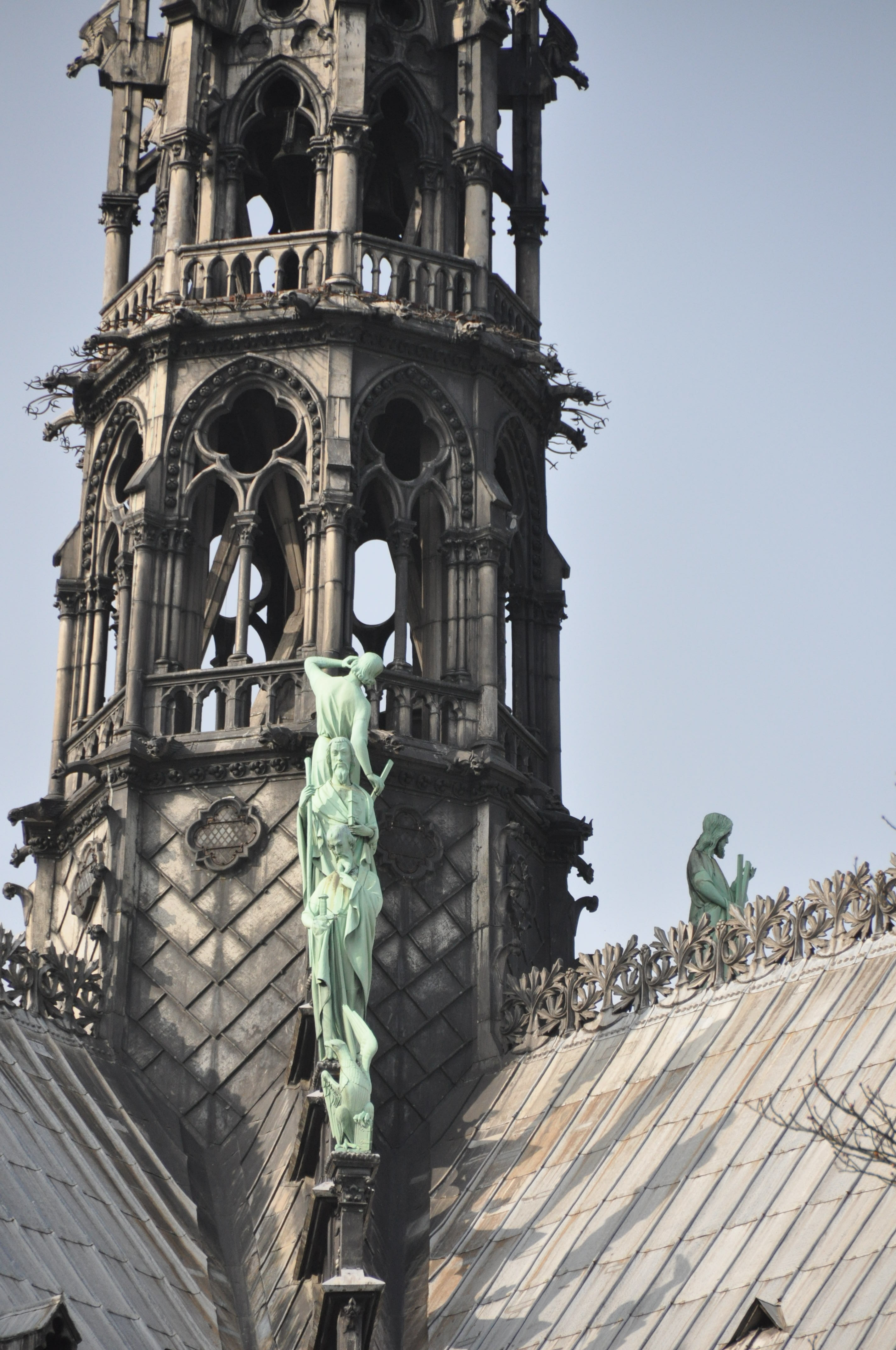 Statue des apôtres au pied de la flèche